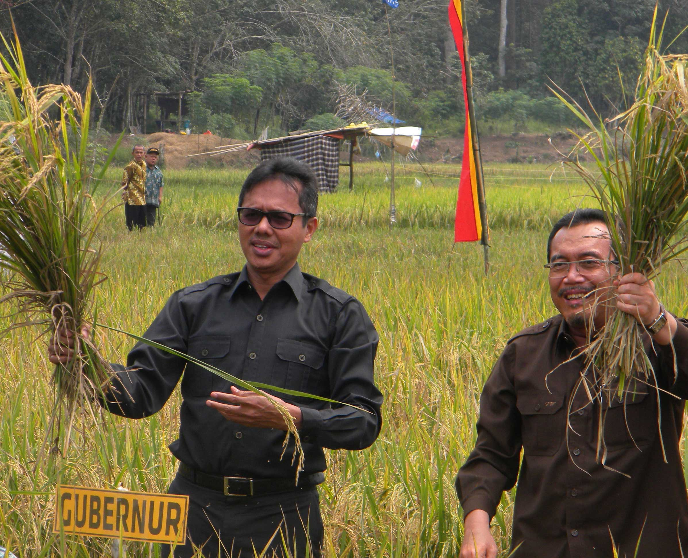 Menteri Pertanian Panen Padi Sawah Bukaan Baru di Dharmasraya